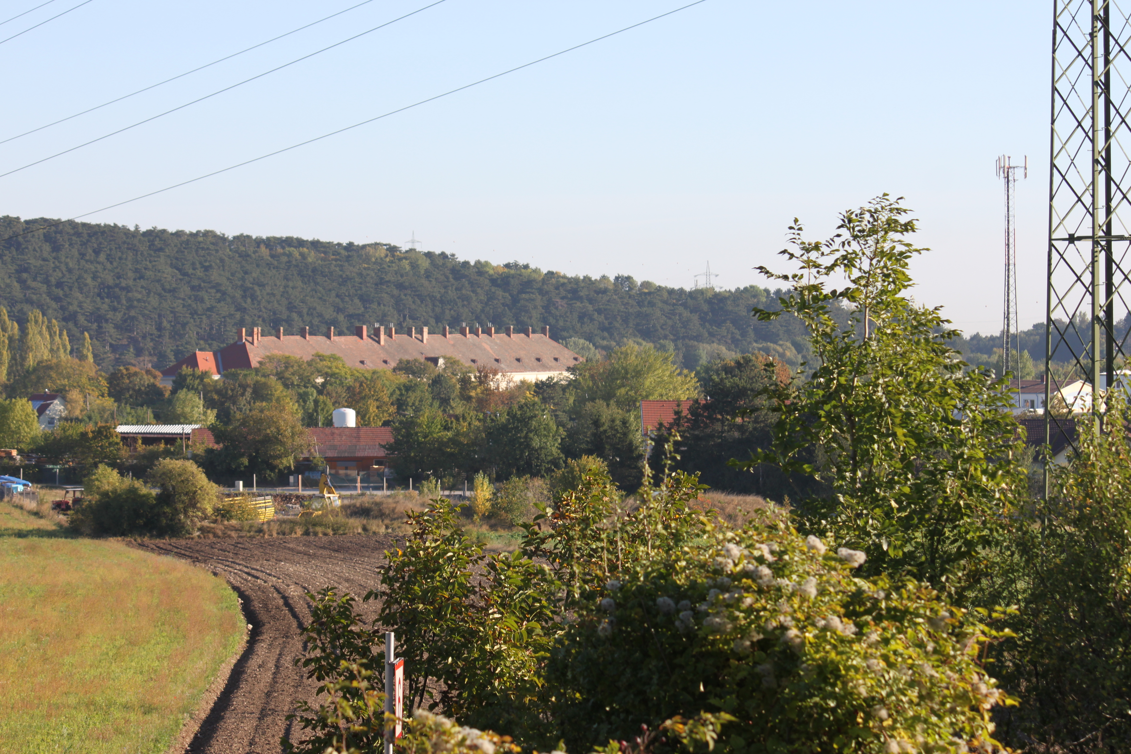 Babenberger-Kaserne in Wöllersdorf, von der B 21, Gutensteiner Straße, Richtung Nordosten fotografiert